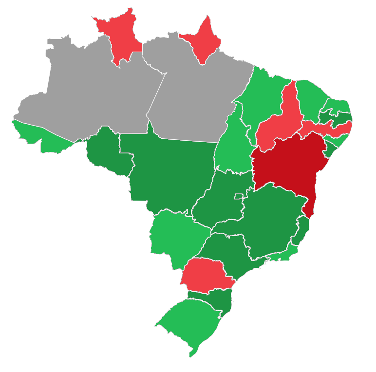 Mapa do resultado da votação no plenário do Senado sobre o pedido de impeachment de Dilma Rousseff. Sim—3 senadores Sim—2 senadores Sem maioria—1 sim, 1 não, 1 abstenção Não—3 senadores Não—2 senadores